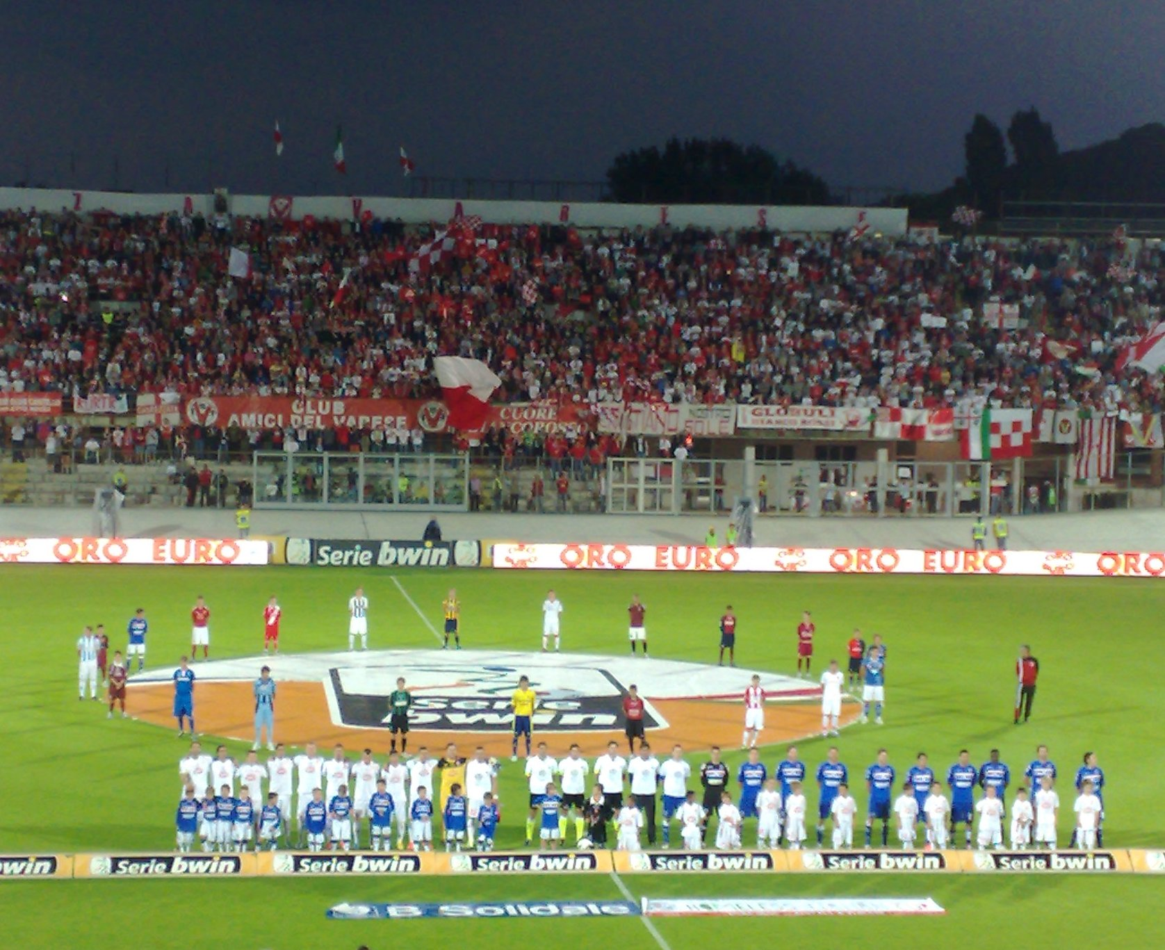 Varese, stadio Franco Ossola, 9 giugno 2012. Varese — Sampdoria 0-1, finale di ritorno dei play-off del campionato italiano di Serie B 2011-12, valevole per la promozione in Serie A.